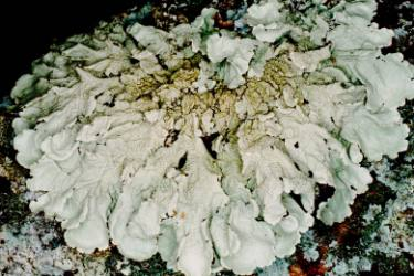 Flavoparmelia baltimorensis